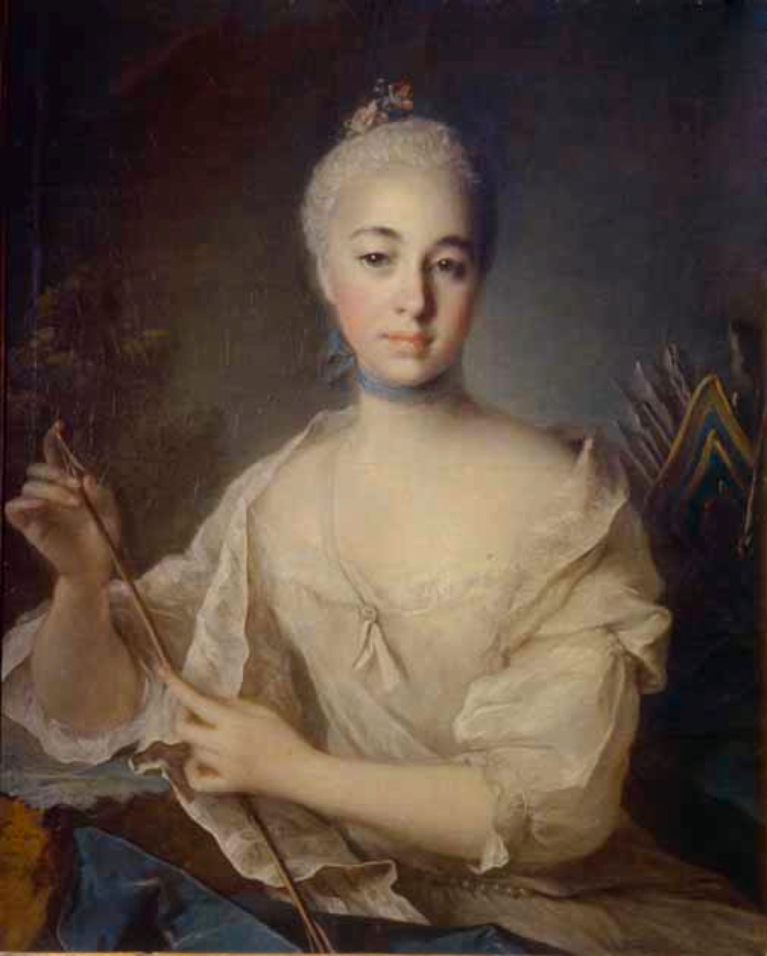 Воронцова Анна Михайловна (графиня), в замужестве Строганова